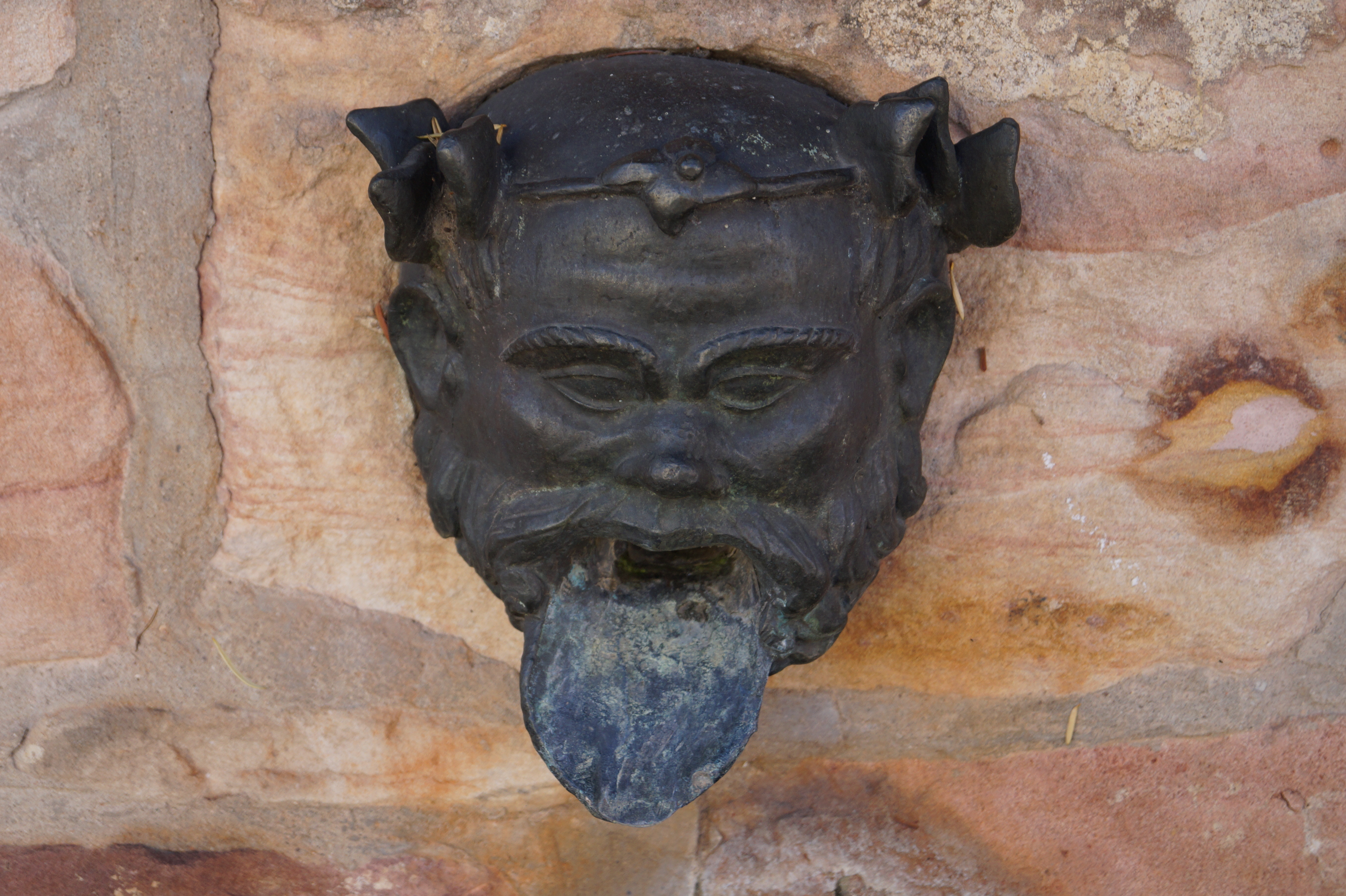 Nachbildung einer römischen Brunnenmaske an der Hauptstraße in Niedernberg, das Original befindet sich im Museum Aschaffenburg.